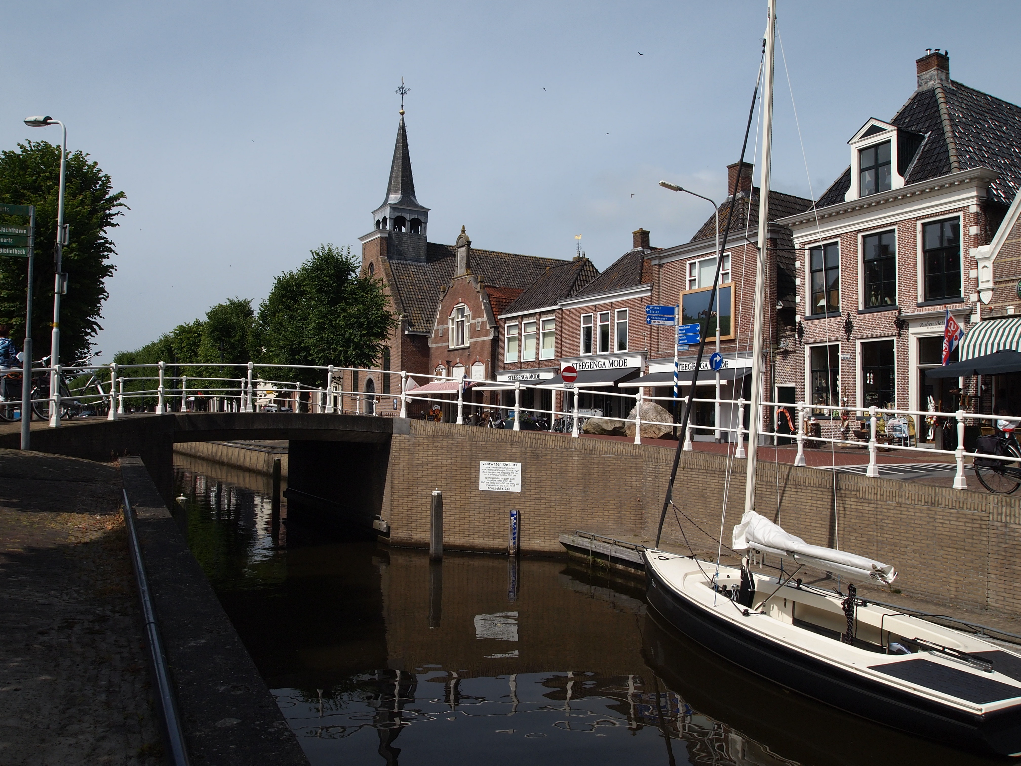 It Breahûs, Van Swinderenstraat 6, Balk